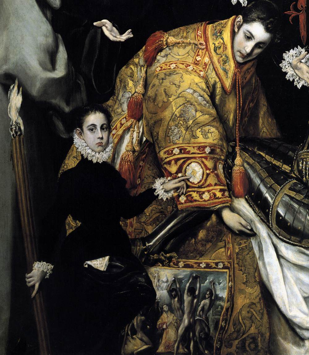 El entierro del señor de Orgaz, más conocido como El entierro del conde de Orgaz, es un óleo sobre lienzo pintado en estilo manierista por El Greco entre los años 1586 y 1588. Fue realizado para la iglesia de Santo Tomé de Toledo, (España), donde aun permanece, y es considerada una de las las mejores obras de su autor. El cuadro representa el milagro en el que, según la tradición, San Esteban y San Agustín de Hipona bajaron del Cielo para enterrar personalmente a Gonzalo Ruiz de Toledo, señor de la villa de Orgaz y fallecido en 1323, en la iglesia de Santo Tomé, como premio por su vida ejemplar de devoción, humildad y obras de caridad. El Greco aceptó el encargo de realizar la obra en 1586, algo más de dos siglos y medio después de los hechos que en ella representó.